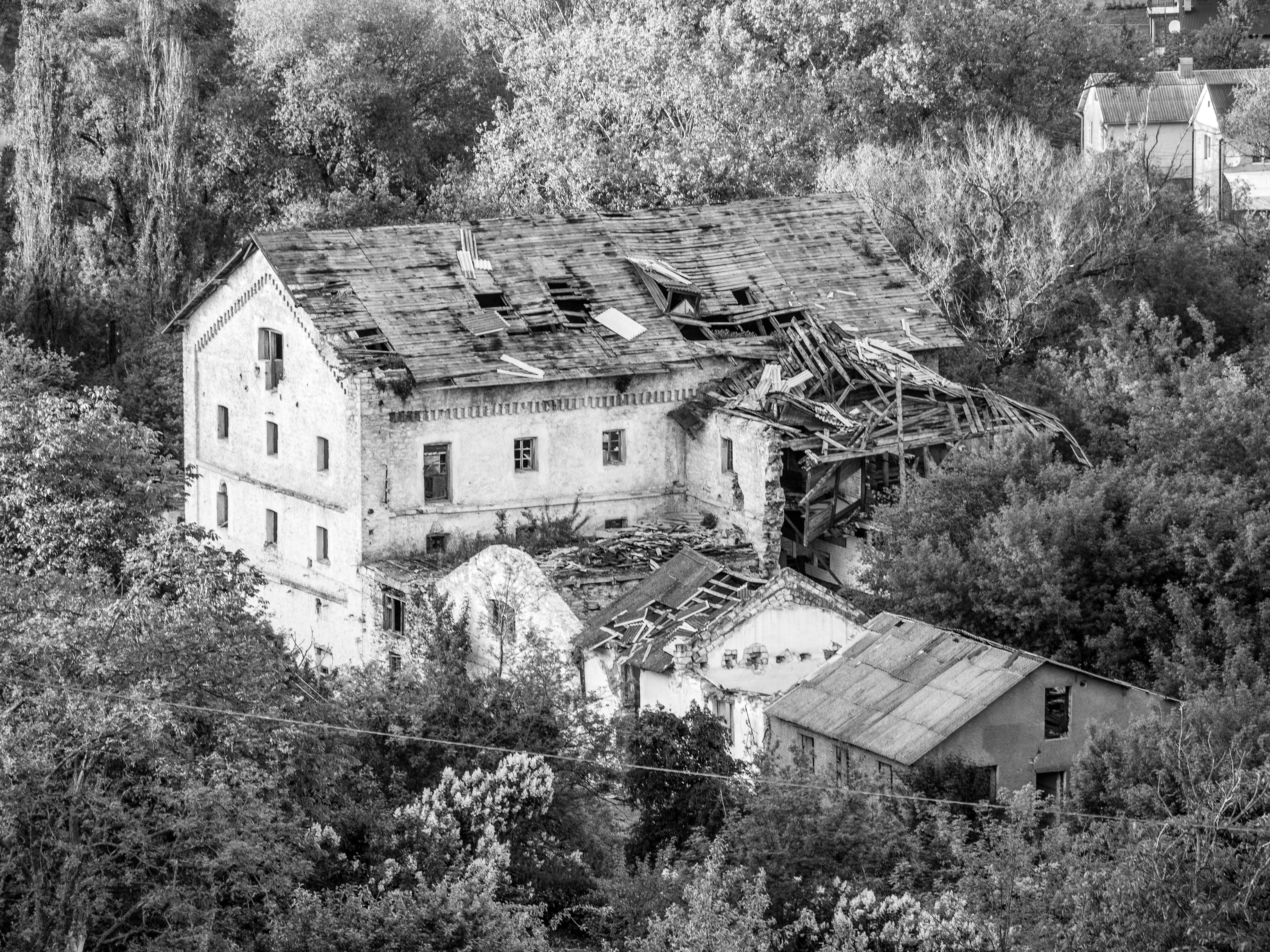 Млин Ірафа, Кам'янець-Подільський, Видровецький узвіз, 24